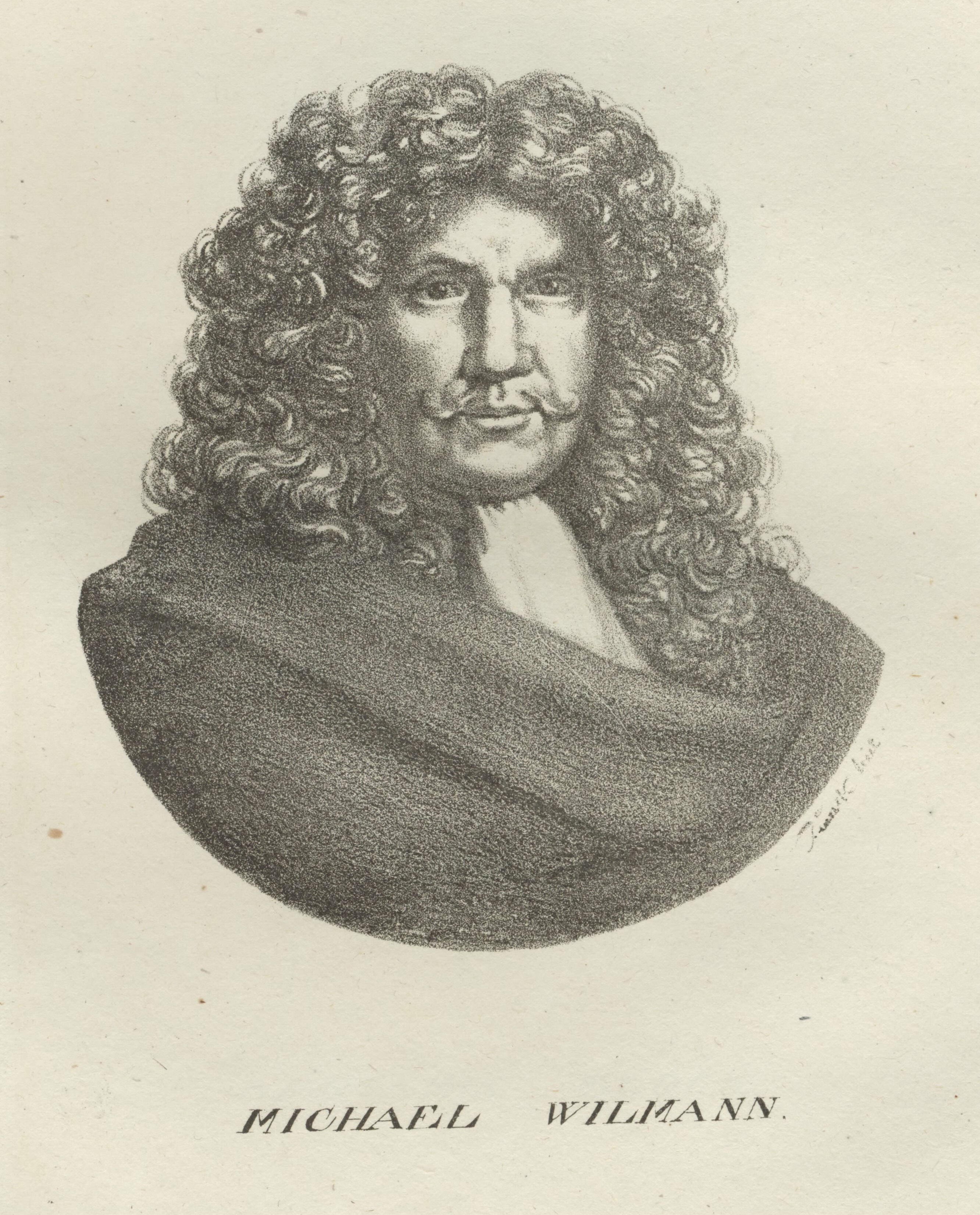 Porträt von Michael Willmann